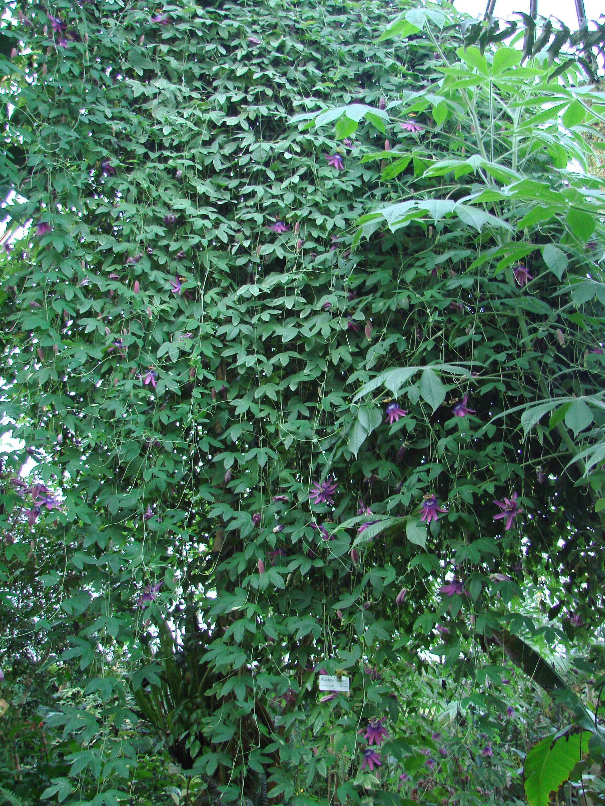 Jardin botanique de l'Université de Zurich (Suisse) : Passiflora loefgrenii F.A. Vitta